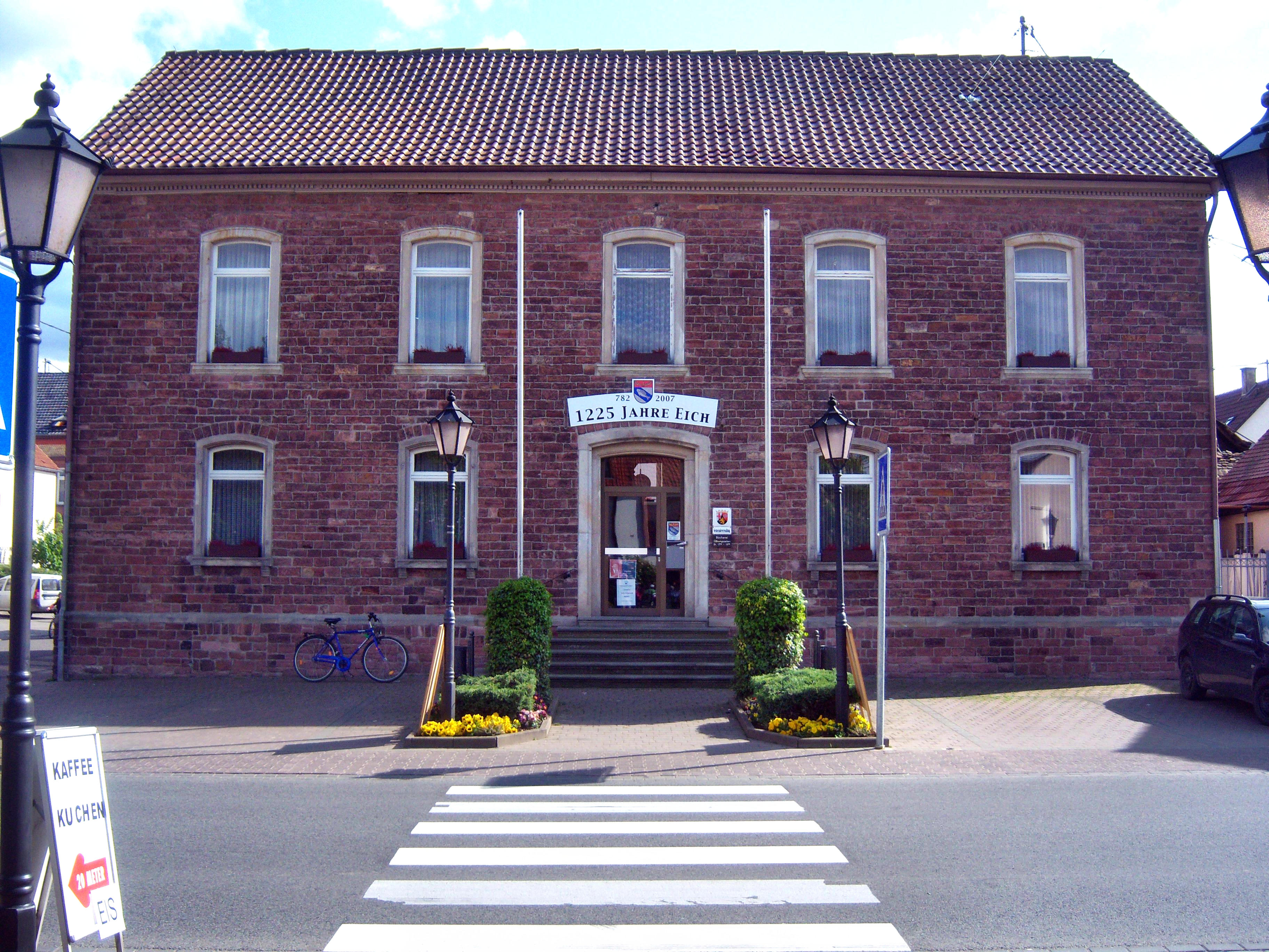 Die Gemeindeverwaltung der rheinhessischen Gemeinde Eich in Deutschland